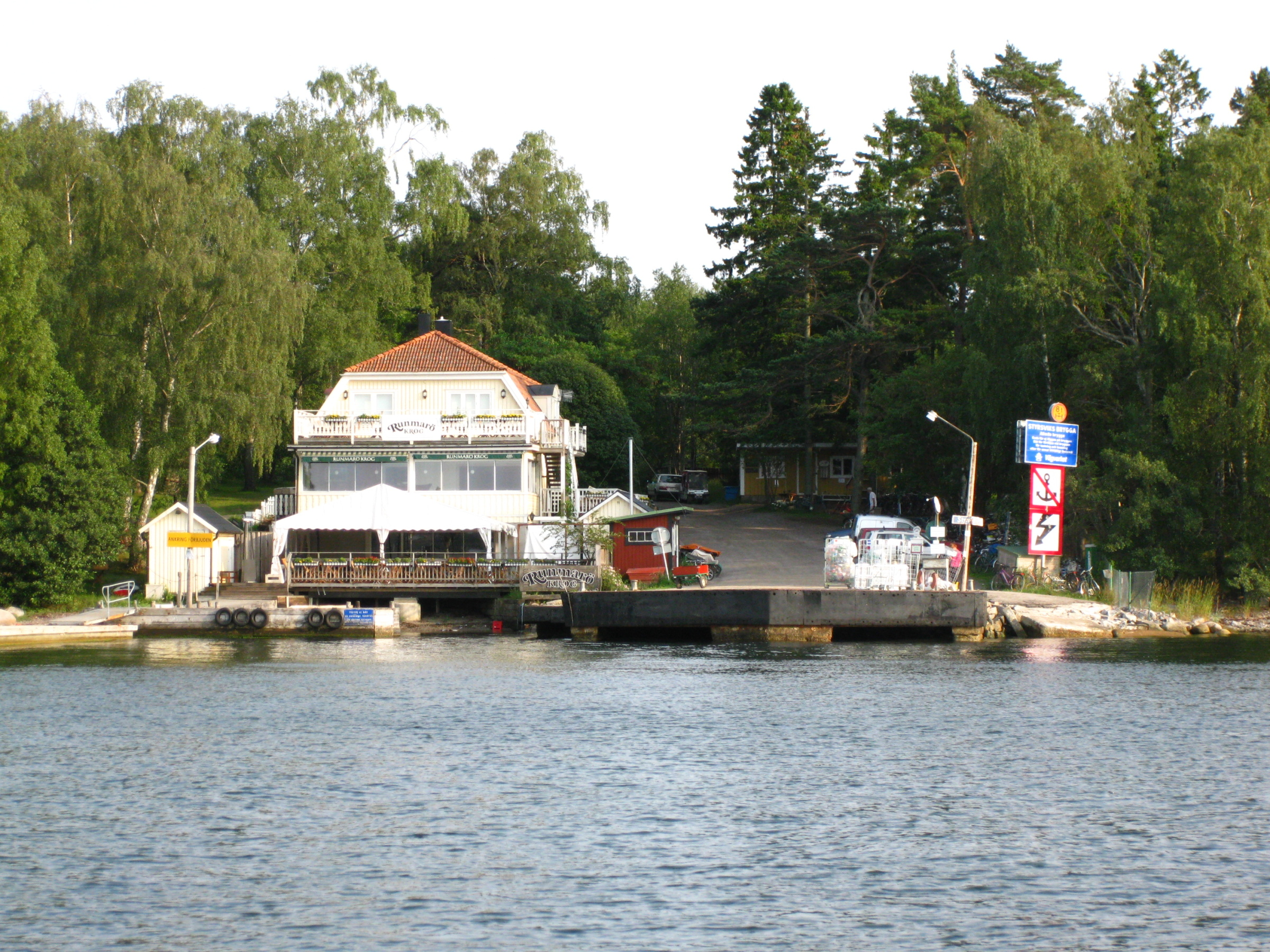 Styrsviks brygga och Runmarö krog, Runmarö, Stockholms skärgård